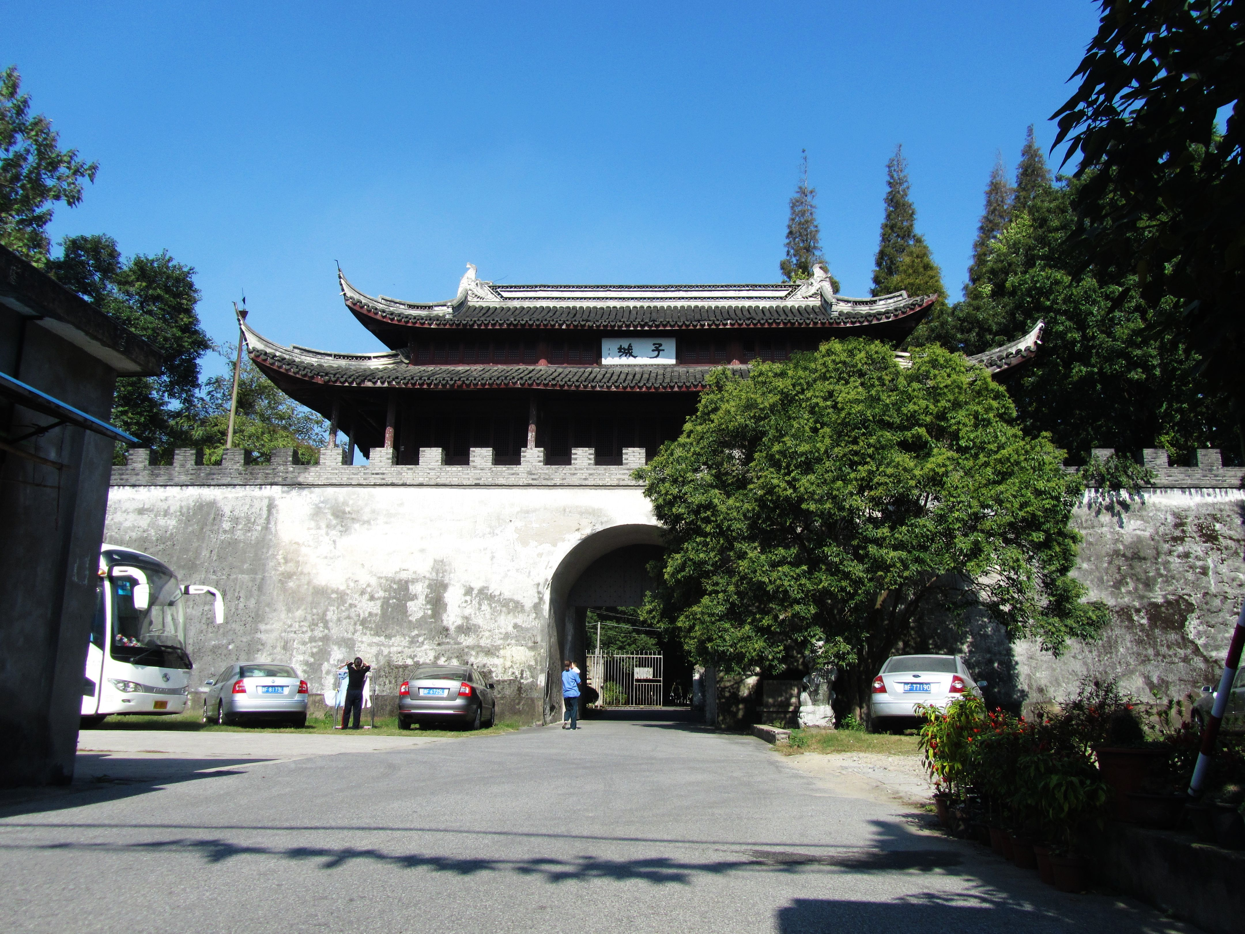 嘉兴子城，原府门及谯楼正面。